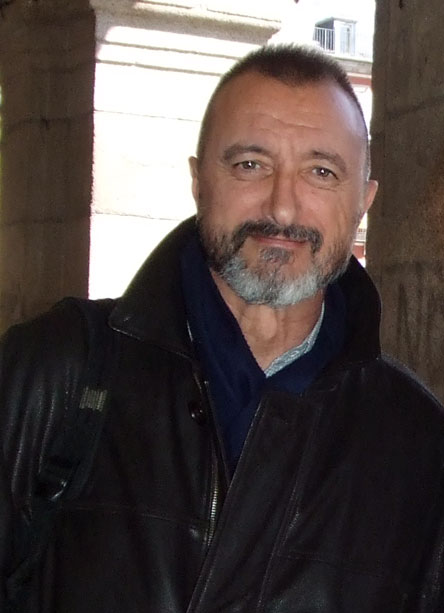 El escritor Arturo Pérez-Reverte en la céntrica Plaza Mayor de Madrid.